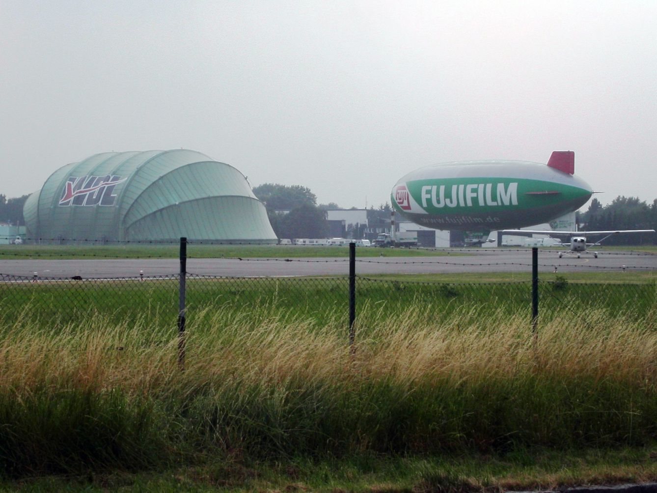 WDL-Zeppelin auf dem Flughafe Essen-Mülheim